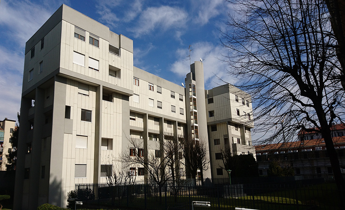 Architetti Associati, Complesso in via Cassoni